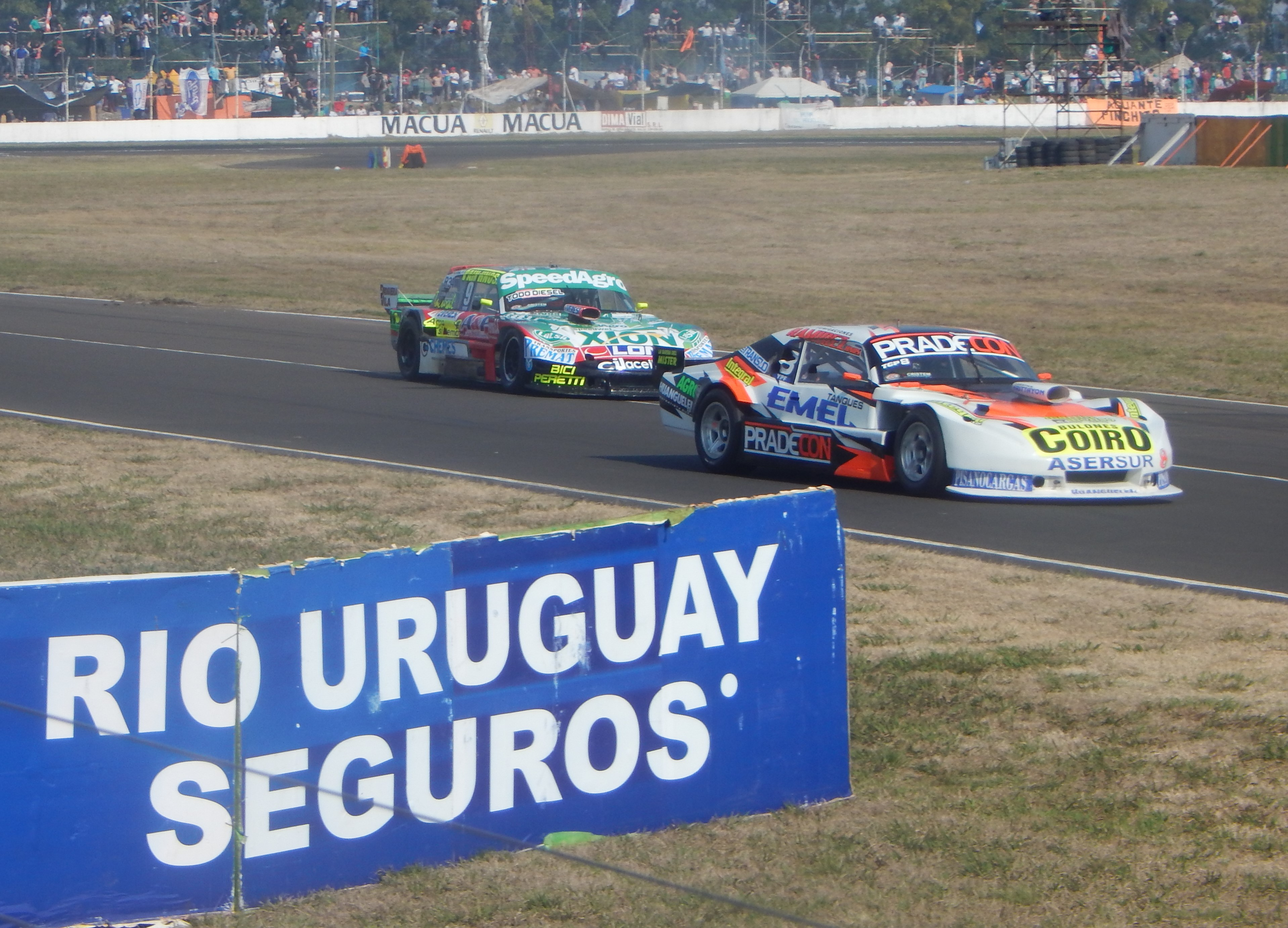 Nicolás González y Emmanuel Pérez Bravo TC Pista en Paraná 2015